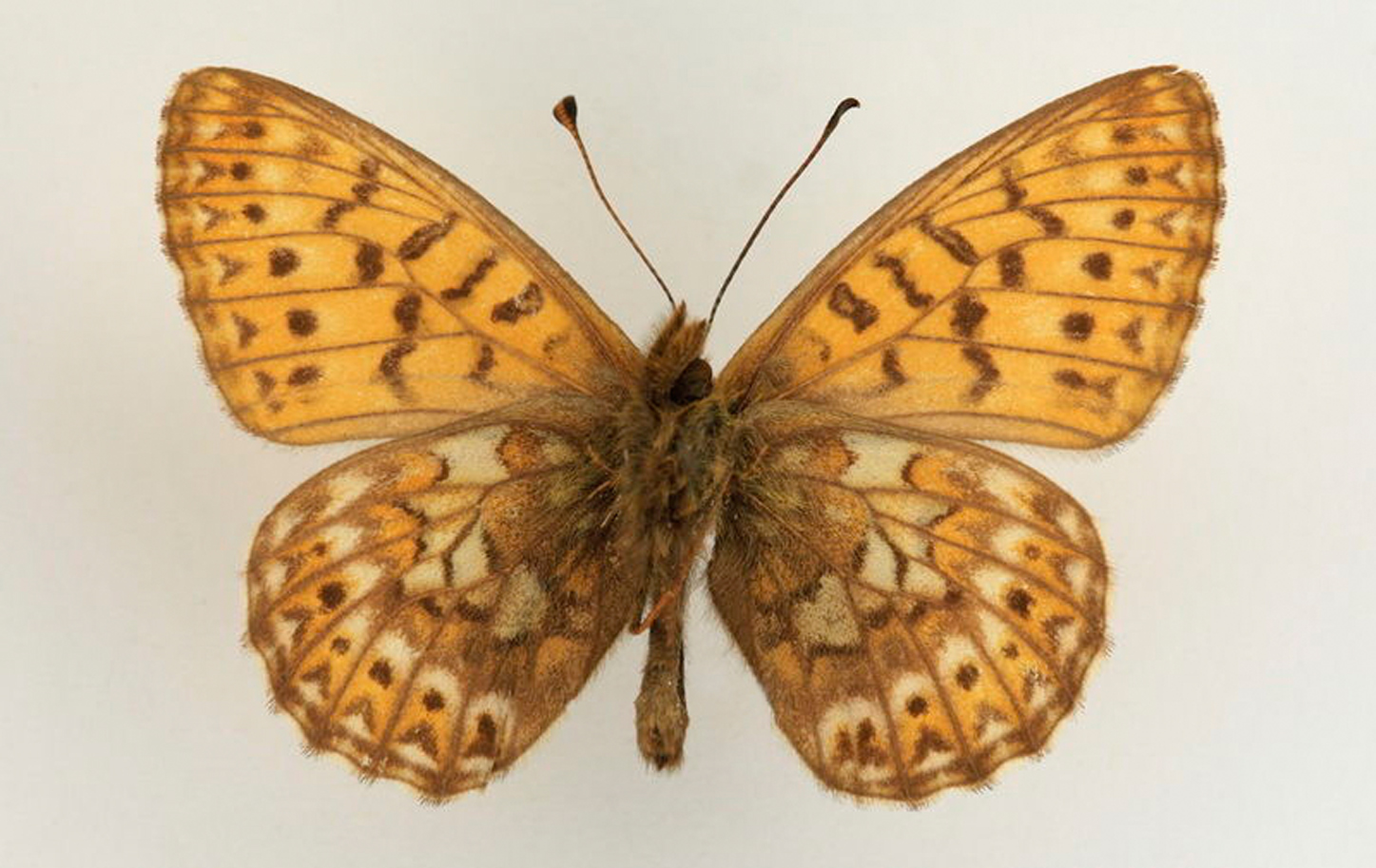 Clossiana matveevi verso